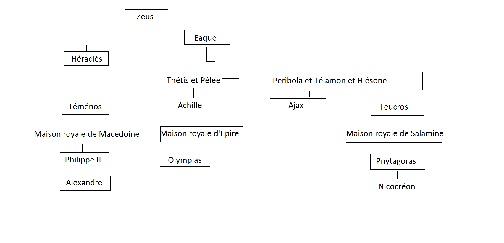 Arbre généalogique de la famille de Nicocréon. Il se dit descendant de Zeus et cousin d'Alexandre.